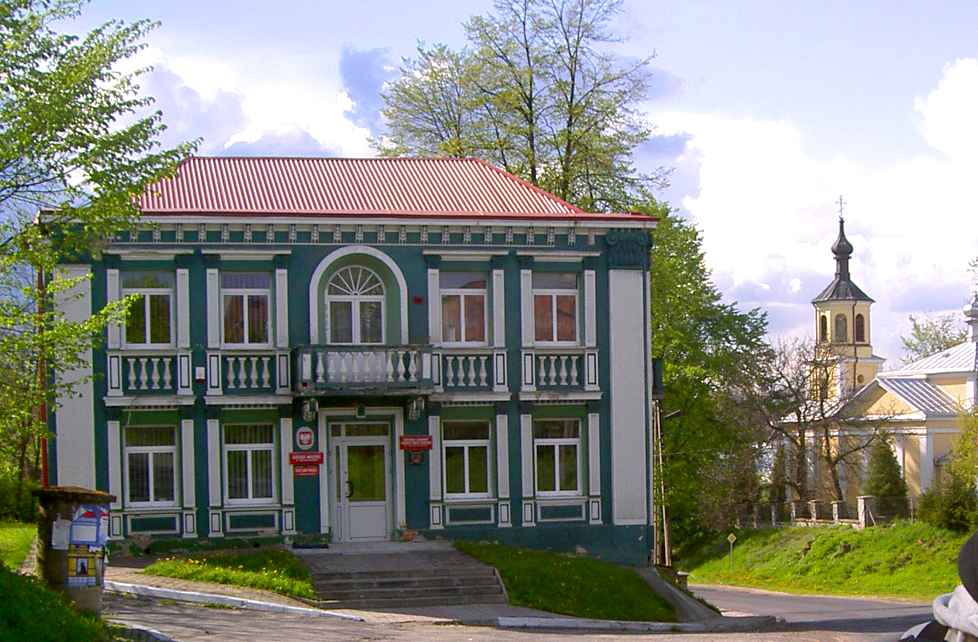 Tarnogród, Poland - Building from 1930 and orthodox church • Tarnogród, Polska - Budynek z 1930 (t.zw. Pałacyk) i cerkiew